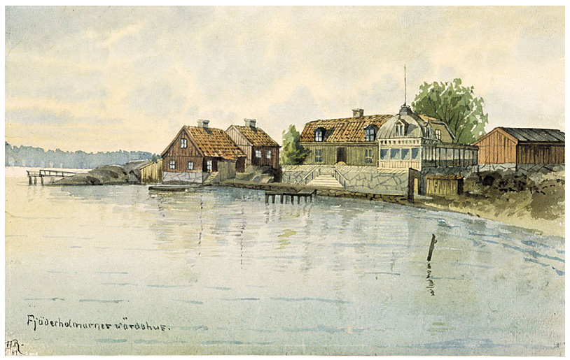 Fjäderhomarnas värdshus